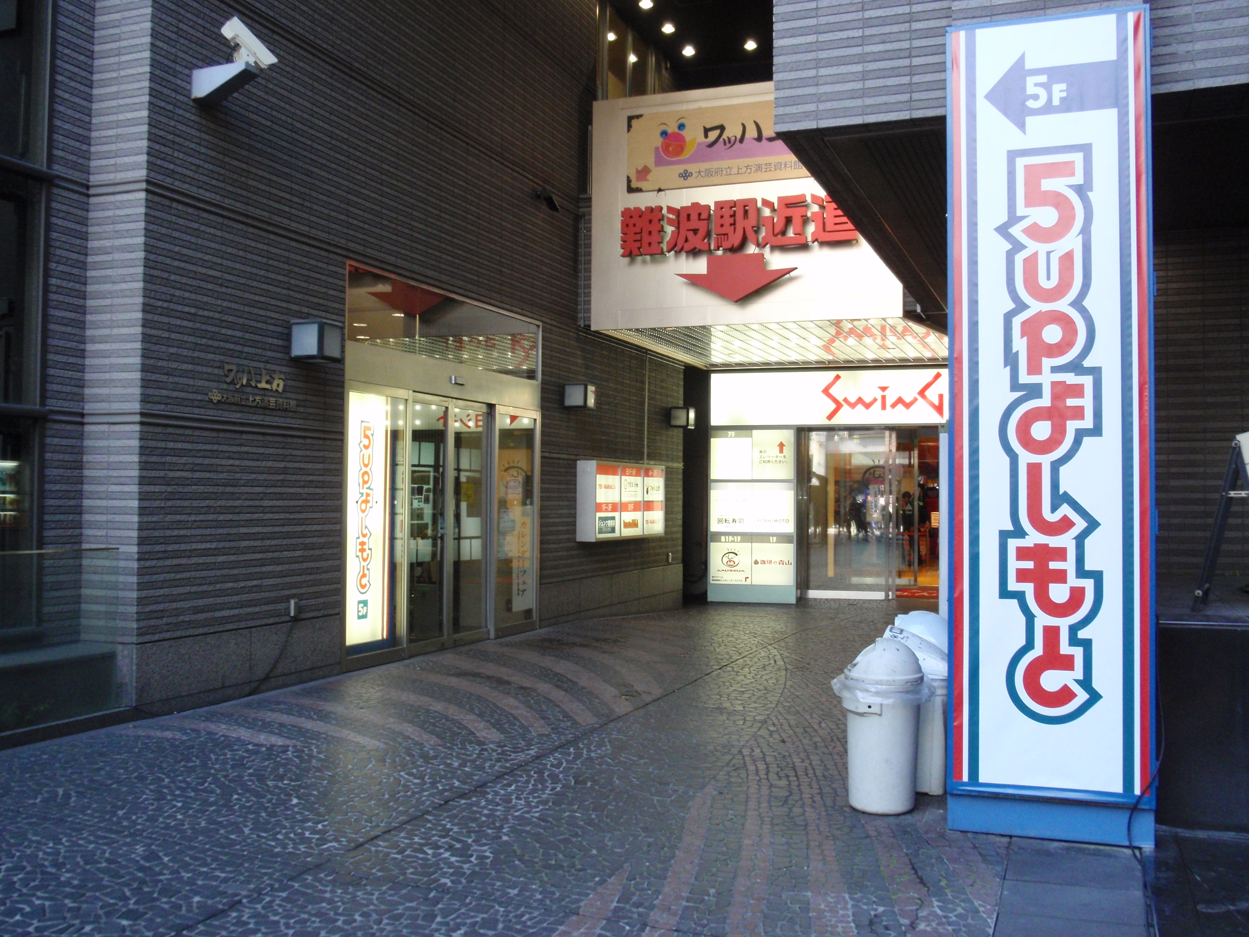 5upよしもとの入口